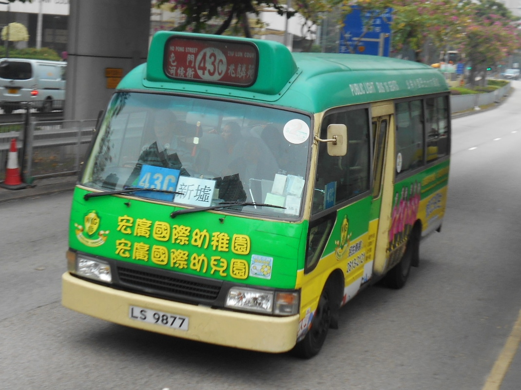 中文（香港）: 新界專線小巴43C線，駛經屯門市中心